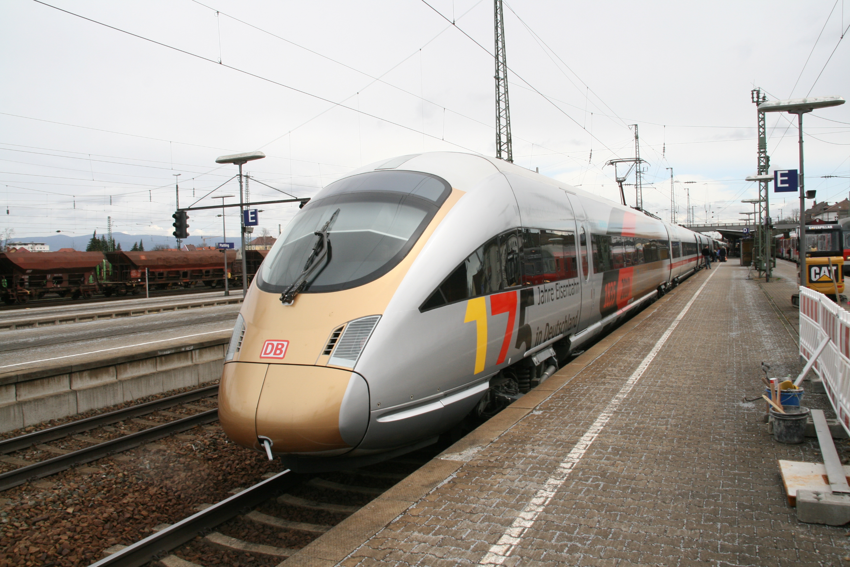 goldener ICE by Niederkasseler